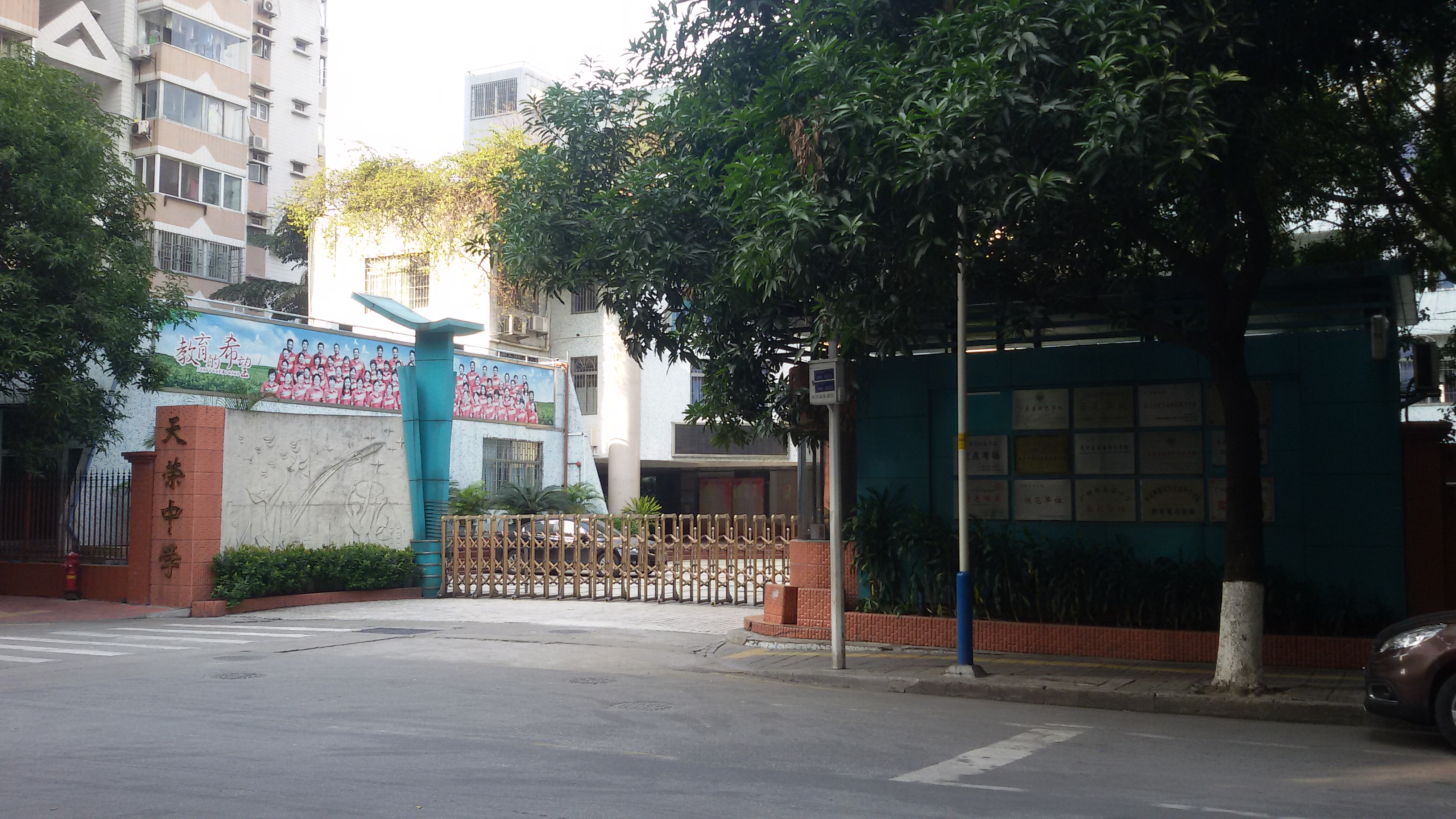 粵語: 天榮中學嘅正門